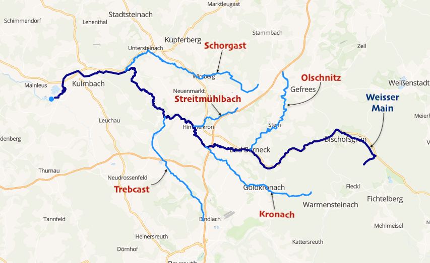 carte réalisée sur umap This map may be incomplete, and may contain errors. Don't rely solely on it for navigation.